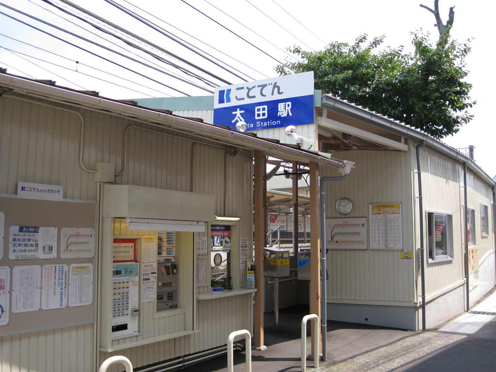 琴電太田駅